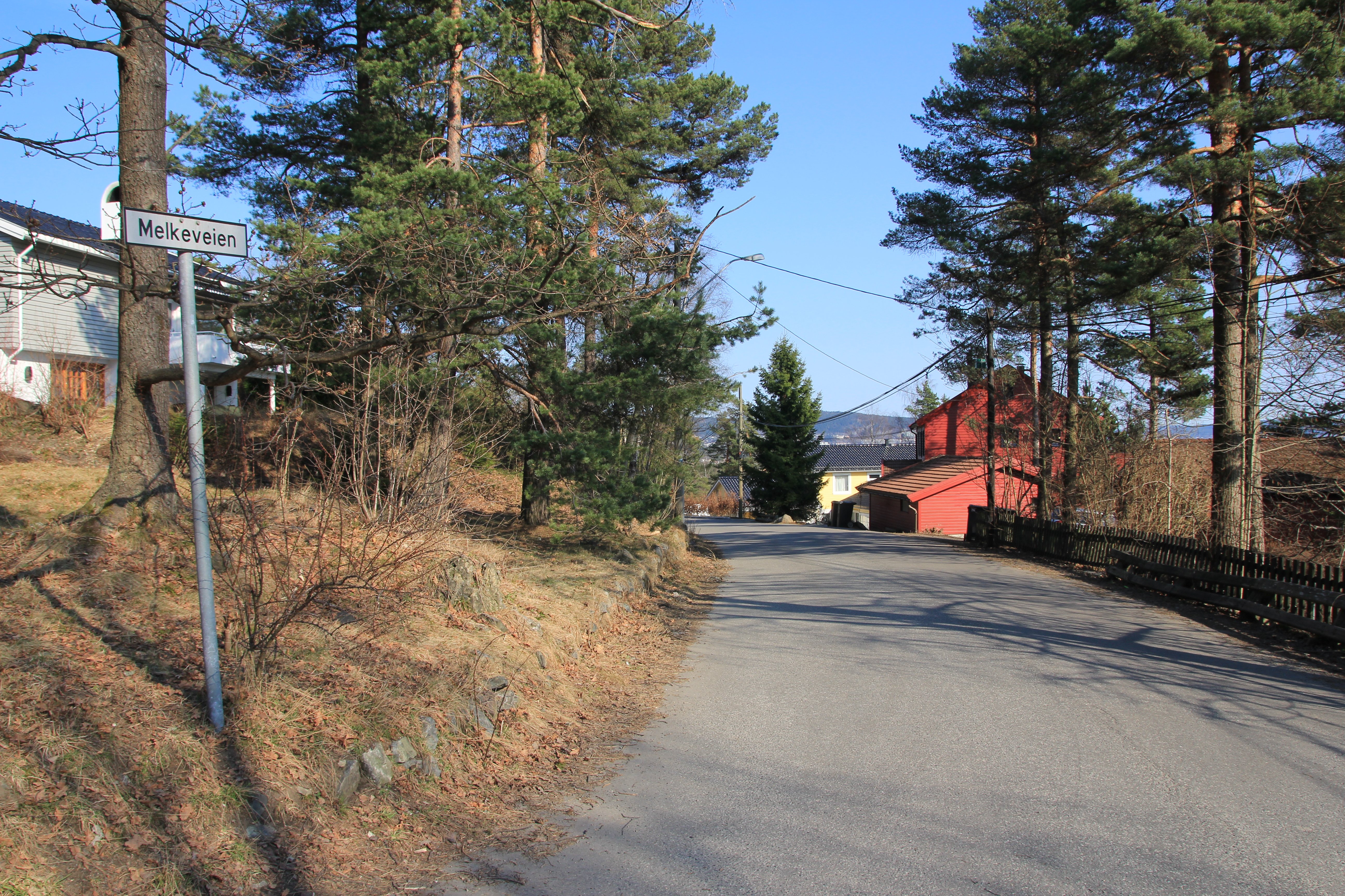 Melkeveien Oslo